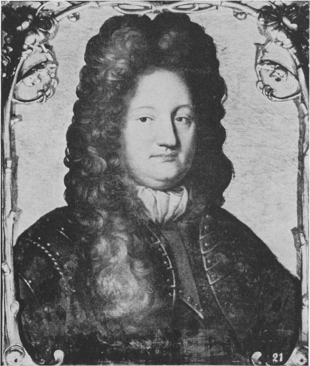 Graf Heinrich Simon zur Lippe